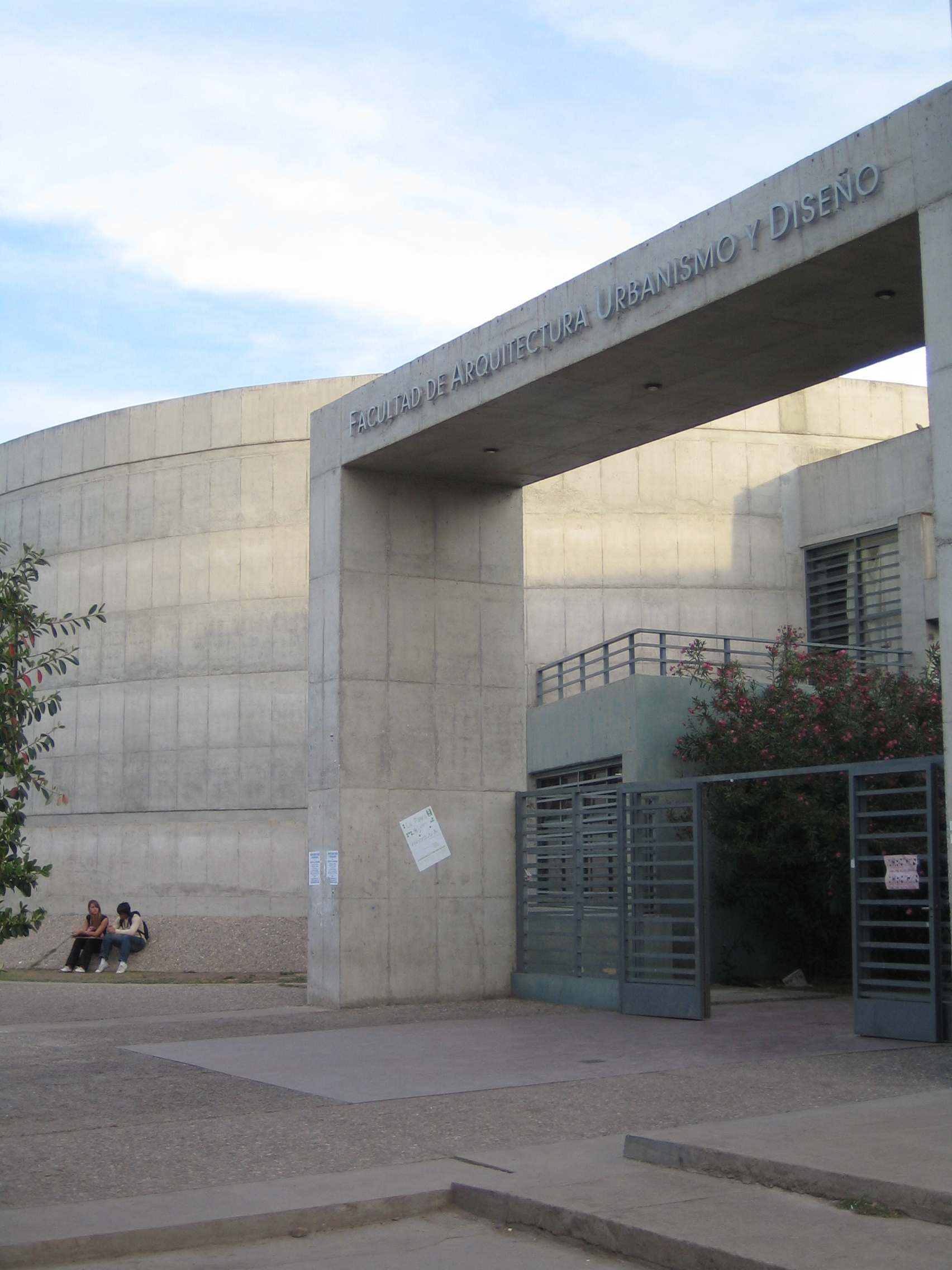 Fachada de la Facultad de Arquitectura Urbanismo y Diseño (UNC)